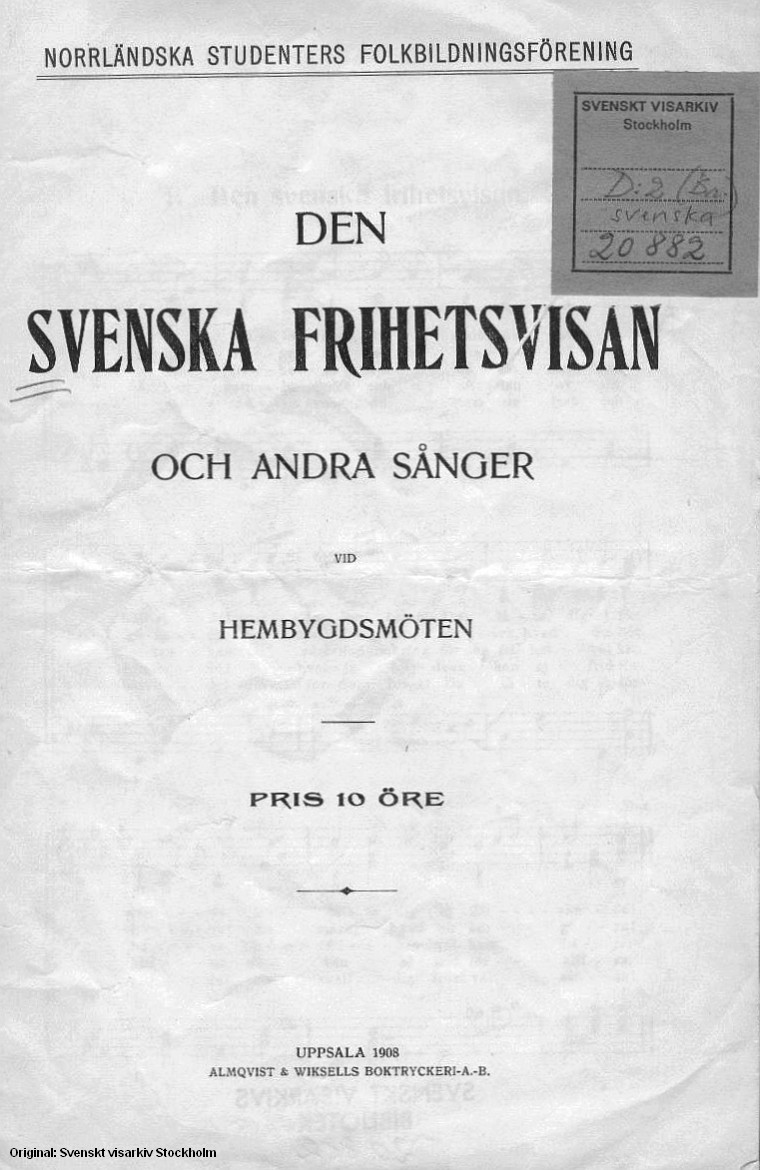 Svenska frihetsvisan, cover page